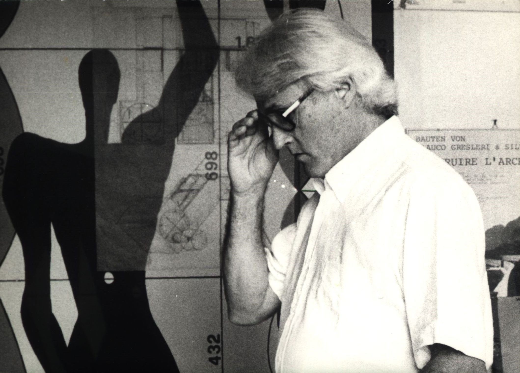 su autorizzazione Archivio Antonio Masotti, Bologna